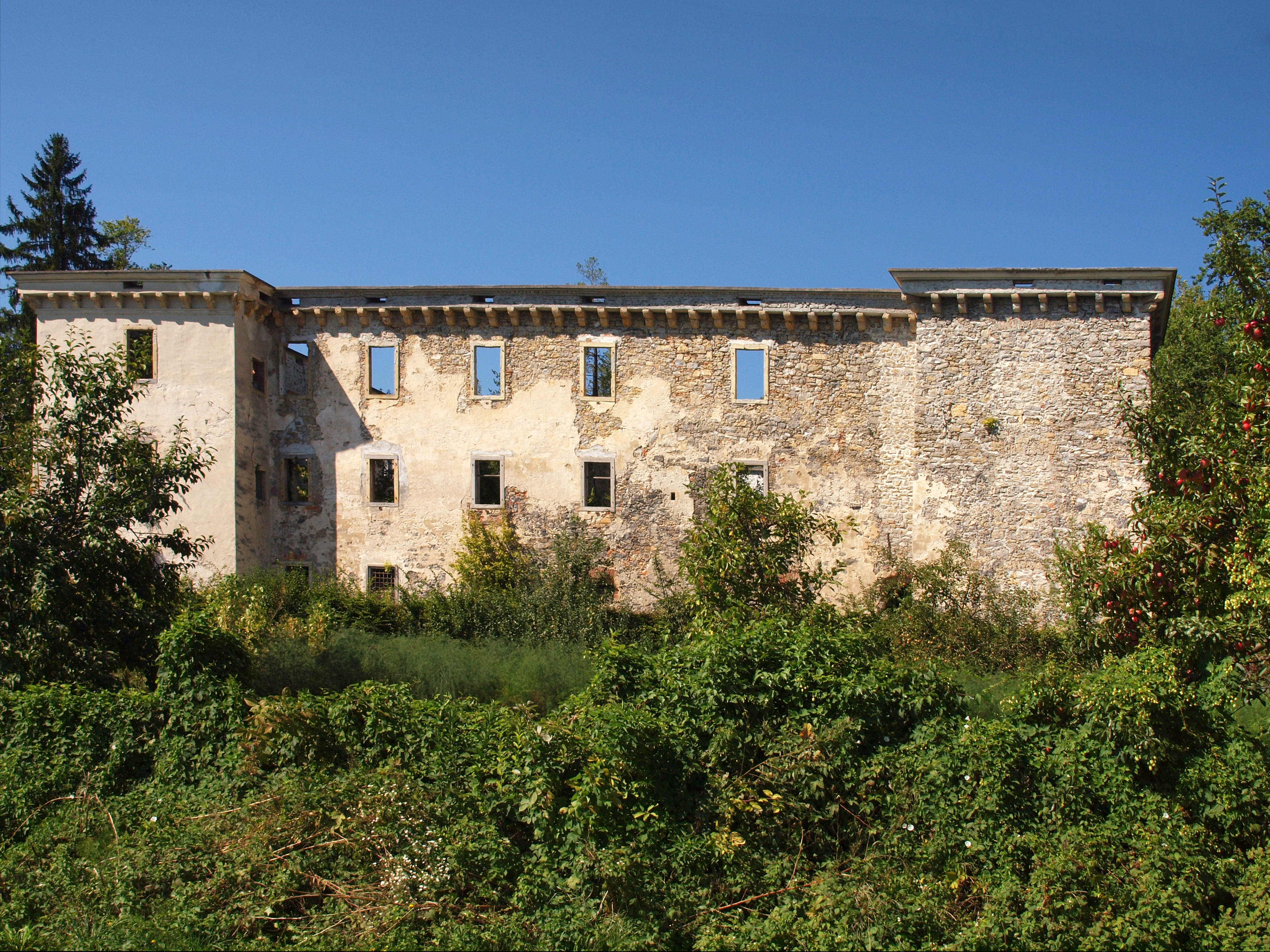 Lukovica - Château de Brdo